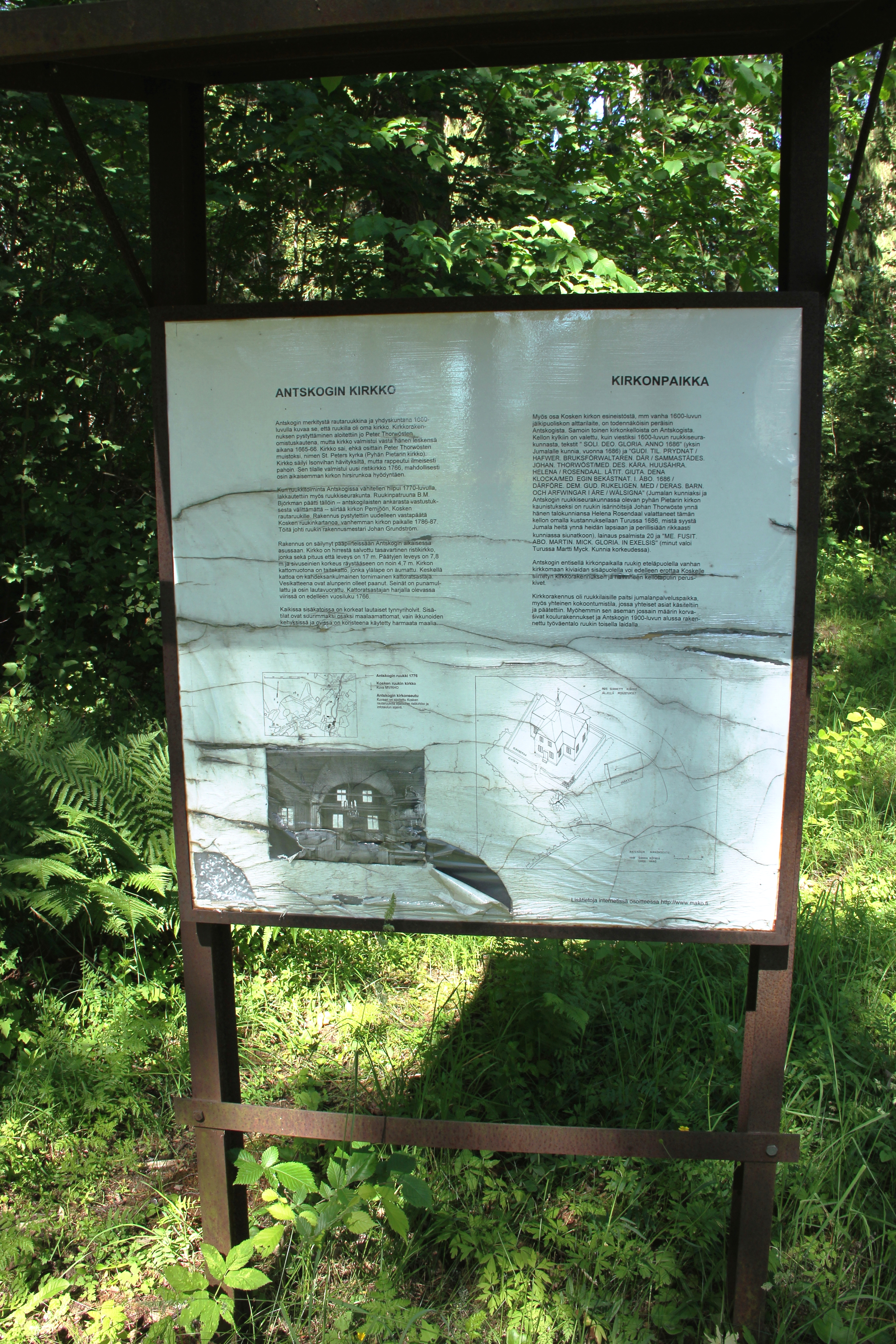 Antskogin ruukin kirkko (Ansku) siirrettiin Perniöön Kosken ruukin kirkoksi 1786–1787